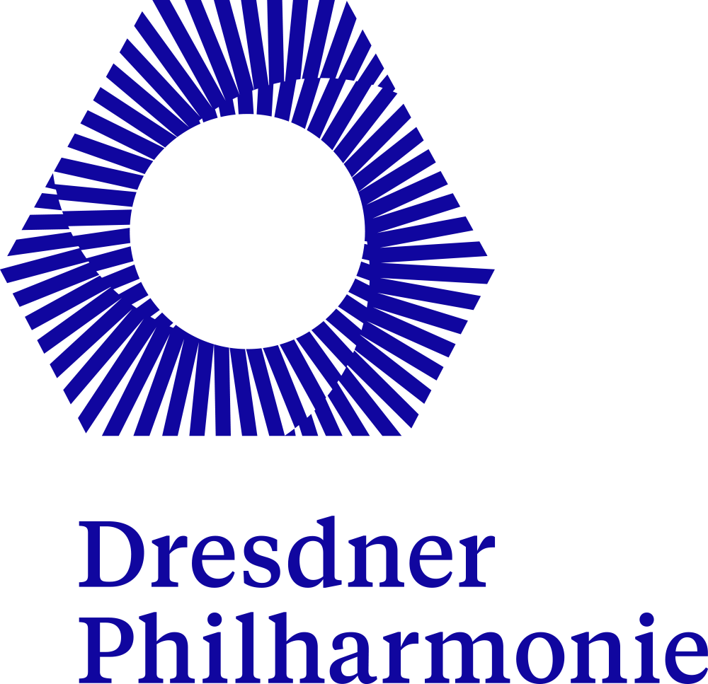 Wort-Bildmarke der Dresdner Philharmonie ab Saison 2019/2020